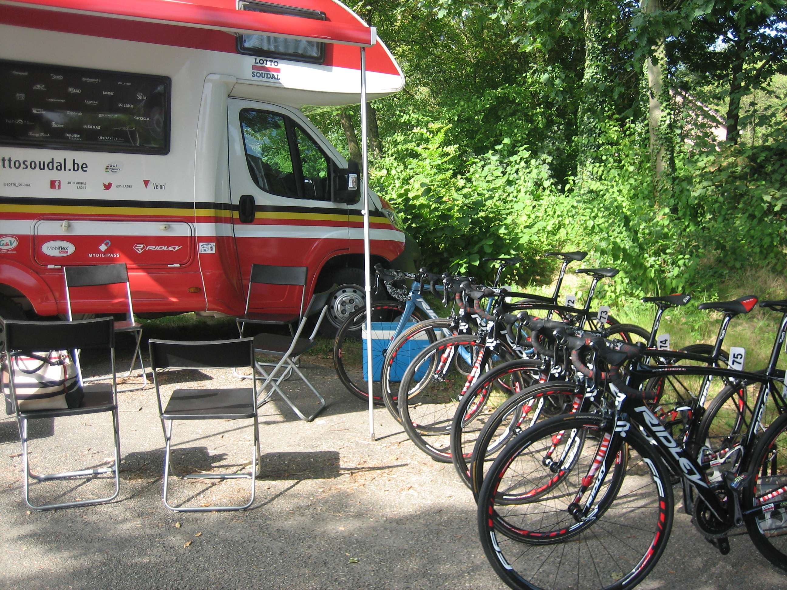 Camper en fietsen van team Lotto Soudal Ladies voor etappe 3 Holland Ladies Tour 2016